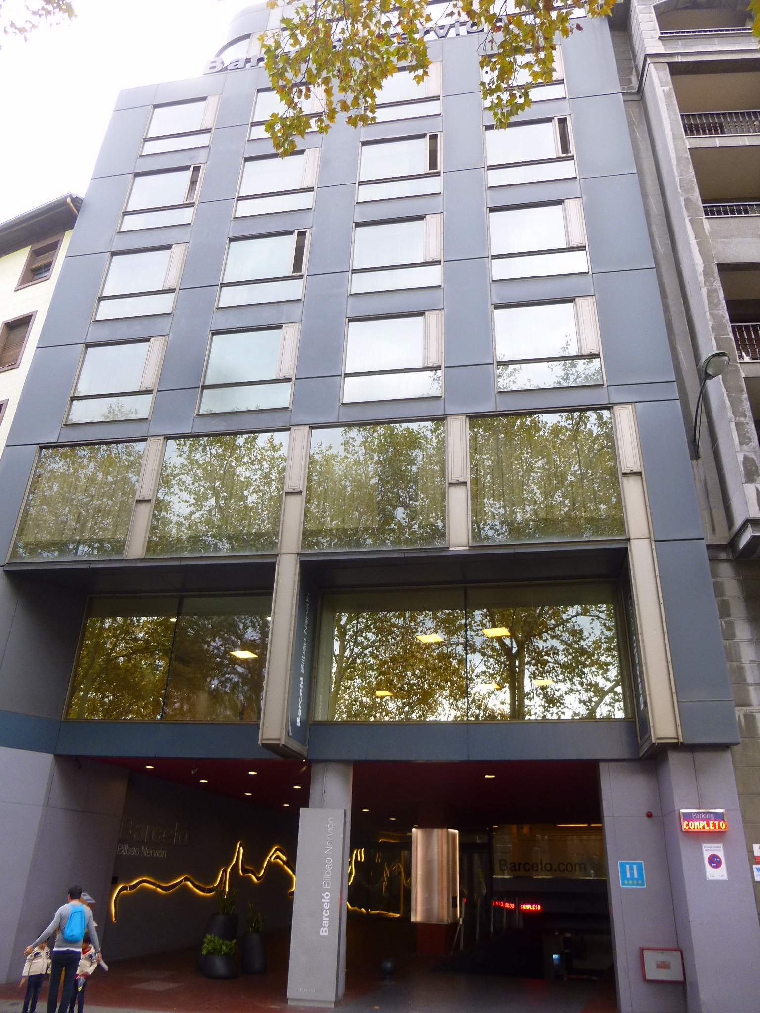 Bilbao - Hotel Barceló Bilbao Nervión